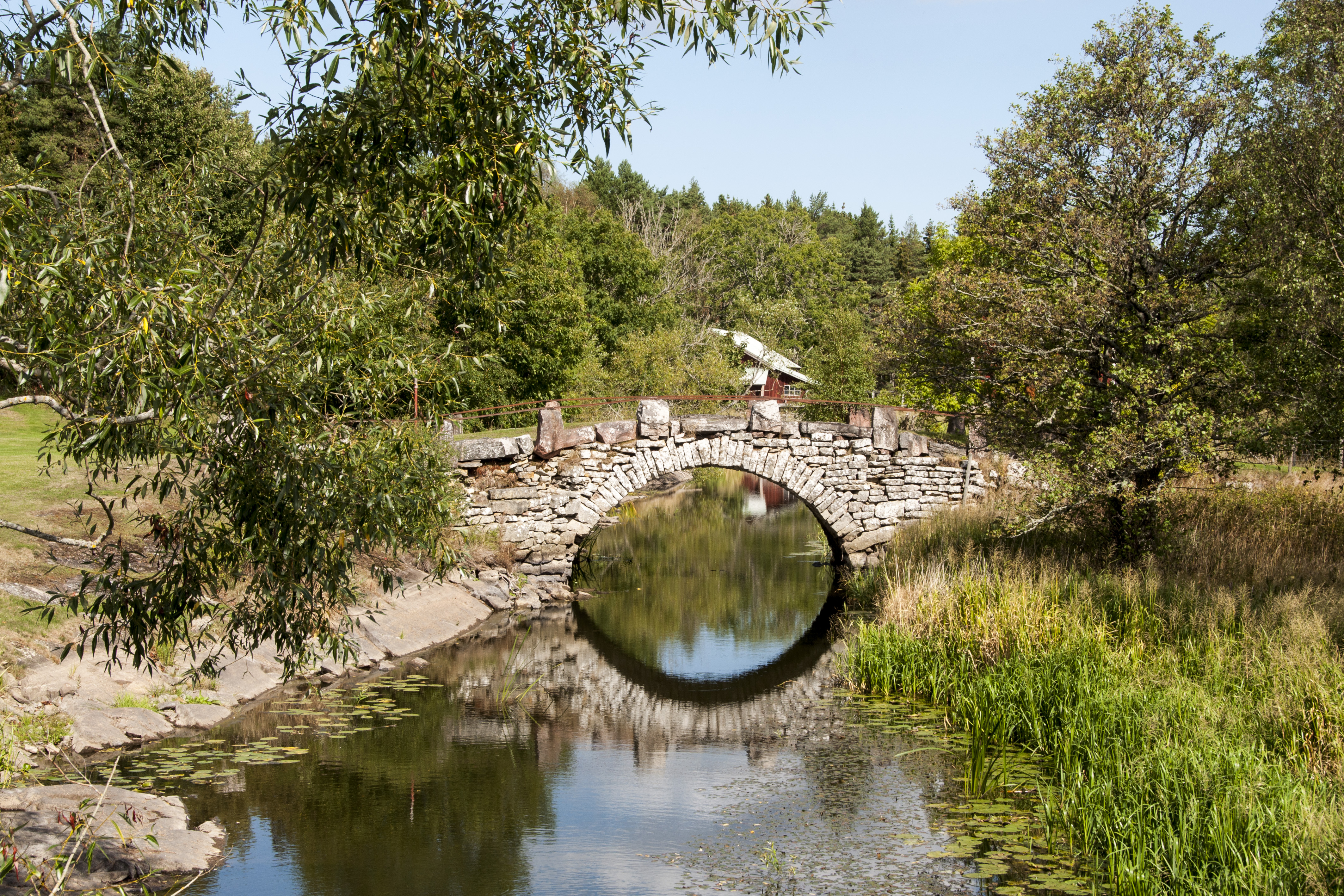 Stampen, stenbro över Sjöråsån